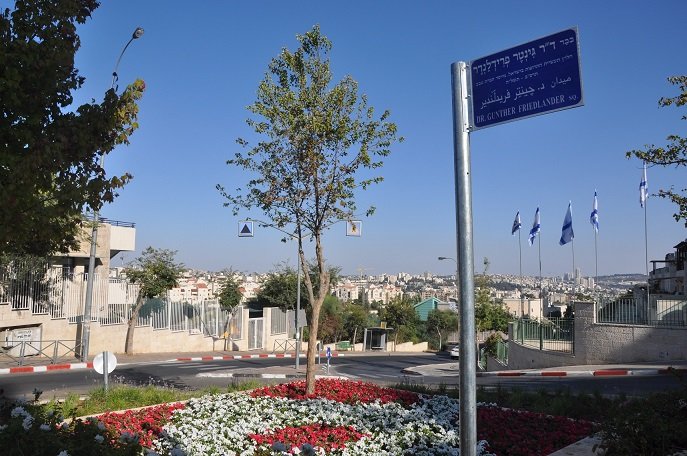 קריאת כיכר ע'ש ד"ר גינטר פרידלנדר בשכונת בית וגן בירושלים